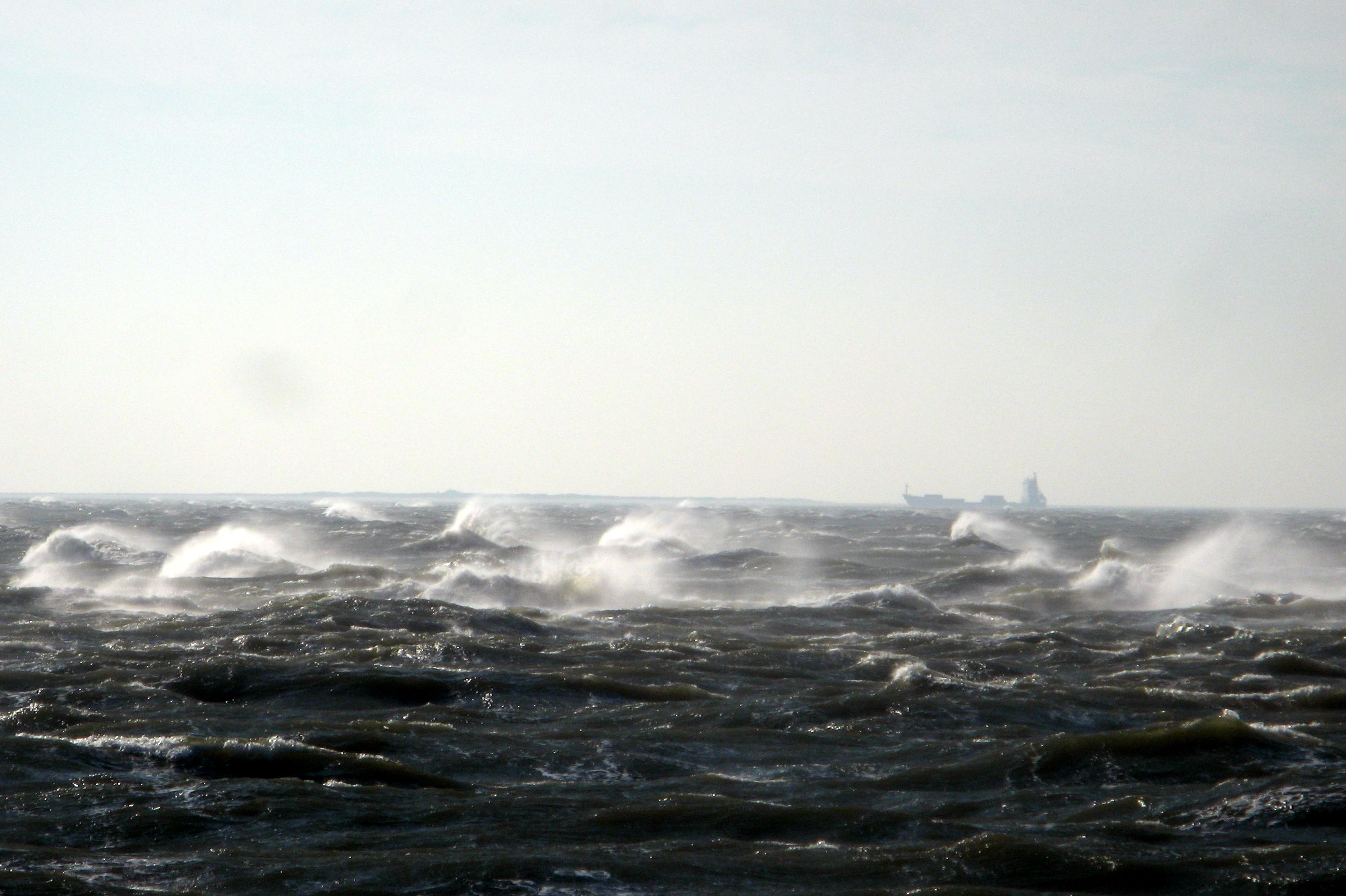 Teile der Sandbank Großer Vogelsand in der Elbmündung, aufgenommen von der Norderelbe, nördlich der Hauptfahrrine und von dieser durch die Sandbank getrennt.